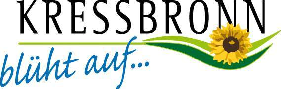 Deutschland - Baden-Württemberg - Bodenseekreis - Kressbronn am Bodensee: Logo der Aktion "Kressbronn blüht auf!"